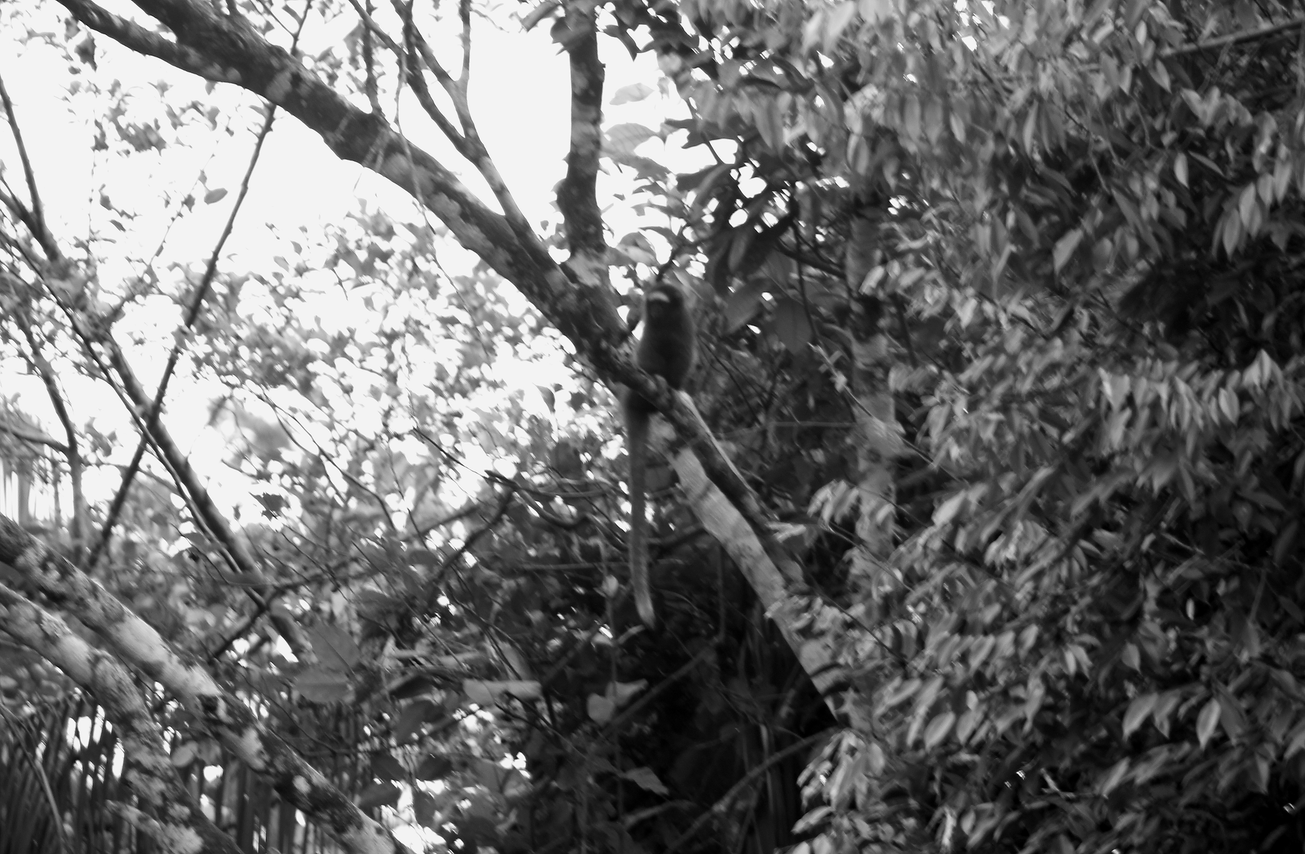 zocay en Vista Hermosa Meta